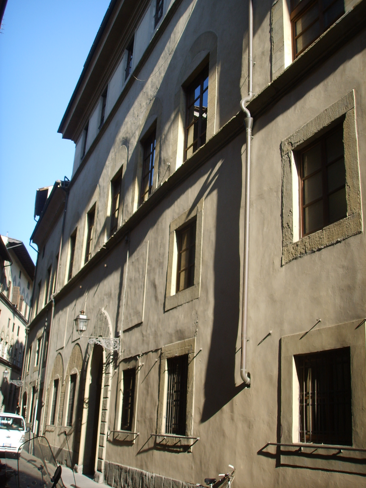 Palazzo gianni vegni 01 esterno